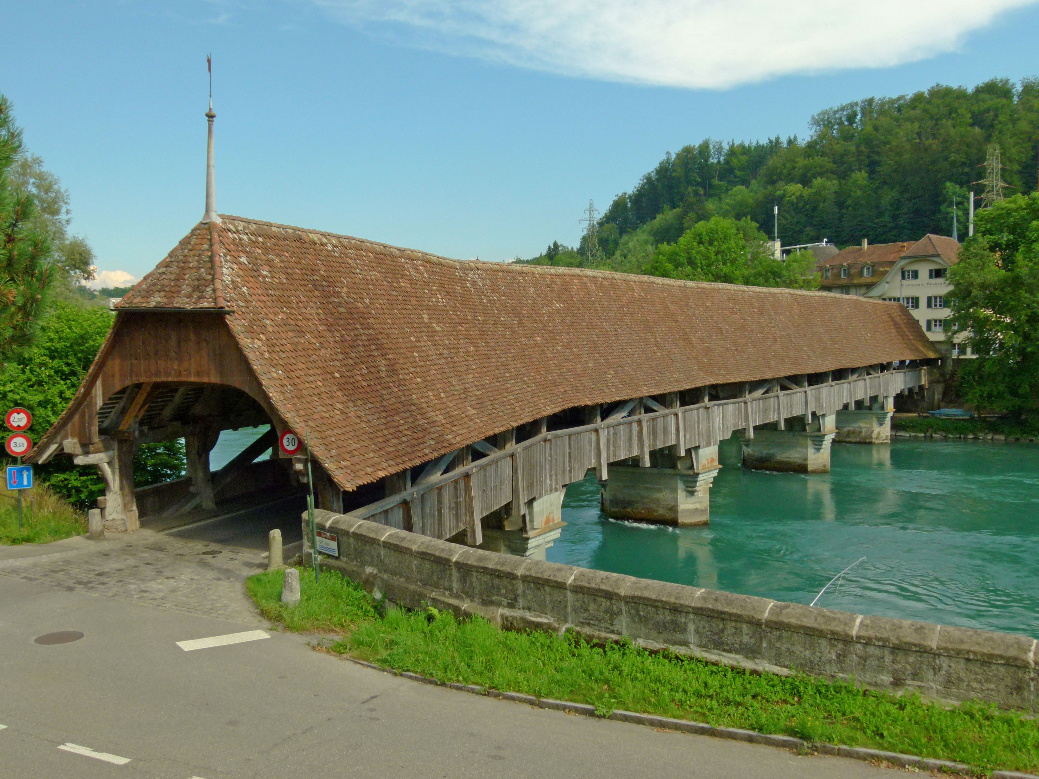 Holzbrücke Bern-Stuckishaus über die Aare, von Nordwest